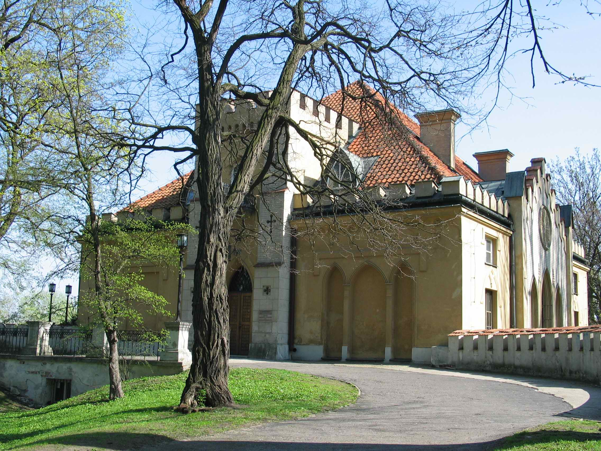 Warszawa - Pałac Szustra - strona północna